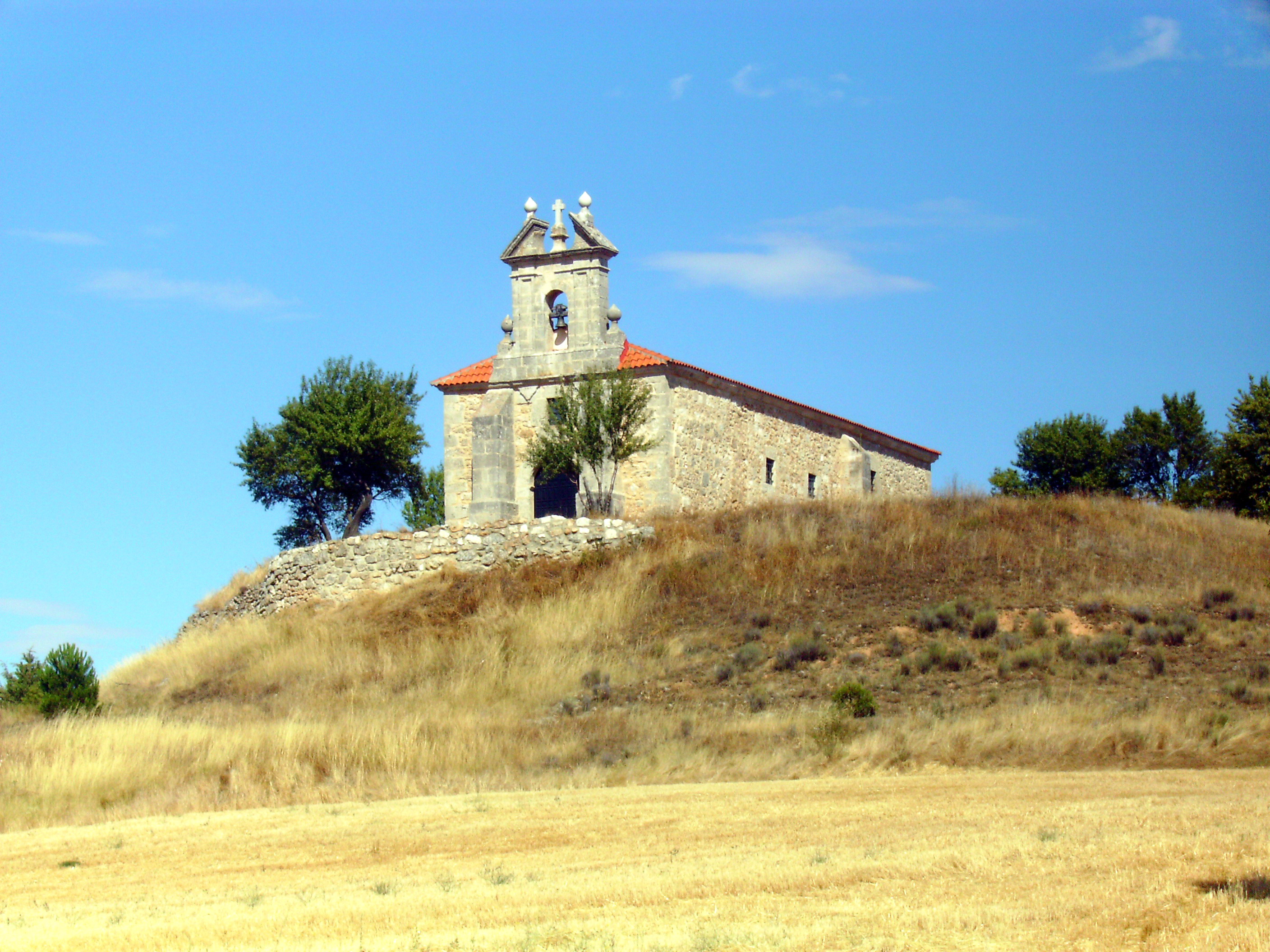 Ermita de Olmedillo de Roa, provincia de Burgos, Comarca de Duero. Está situada a 2 KM del pueblo. Externamente destaca su espadaña y sus grandes pilastras. Alberga a la Virgen de Basardilla. En septiembre el pueblo de Olmedillo realiza la Romería a la Ermita de la Virgen de Basardilla, después de celebrar misa en la ermita la virgen es llevada temporalmente a la Iglesia del pueblo, durante todo el recorrido de vuelta al pueblo los jóvenes acompañan danzando sin parar en honor a la Virgen.